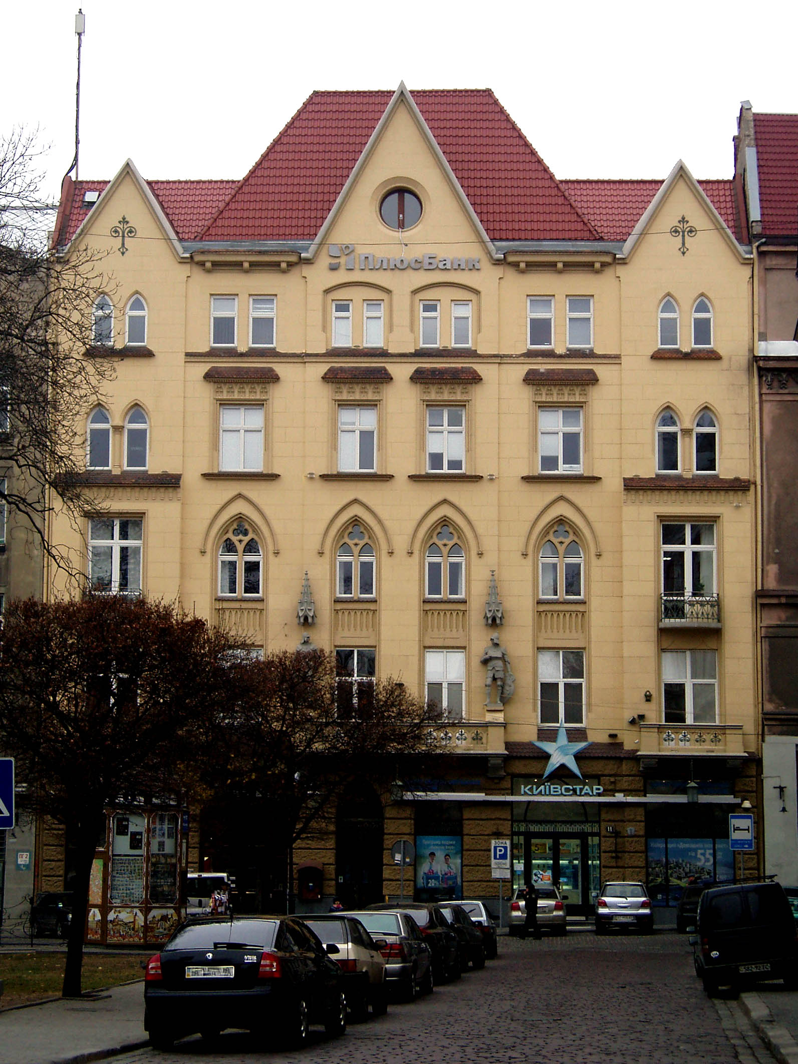 Дім на вулиці Валовій у Львові, збудований 1909 року. Архітектор Артур Шлеєн (1866-1912)